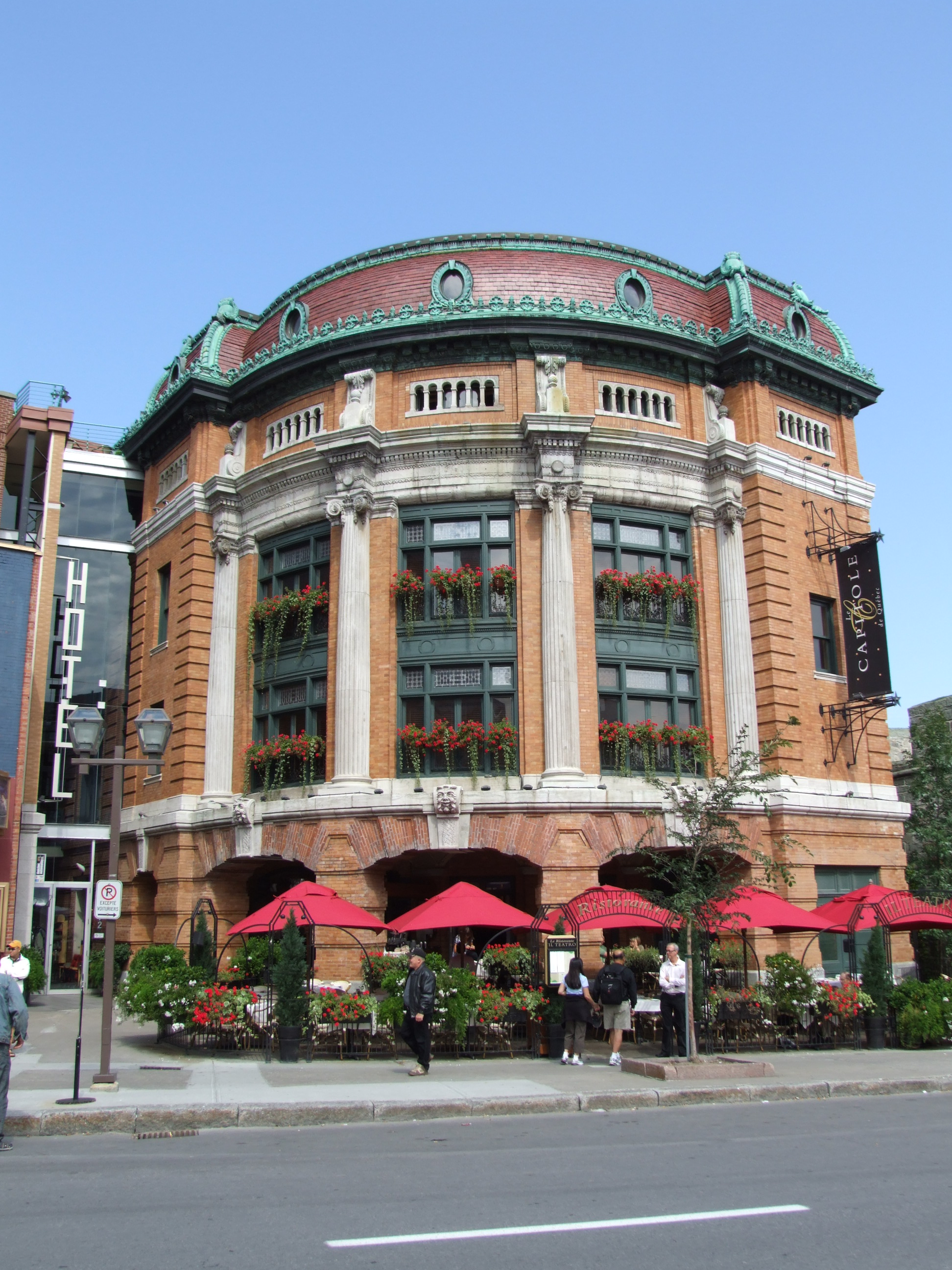 ville de Québec, CANADA